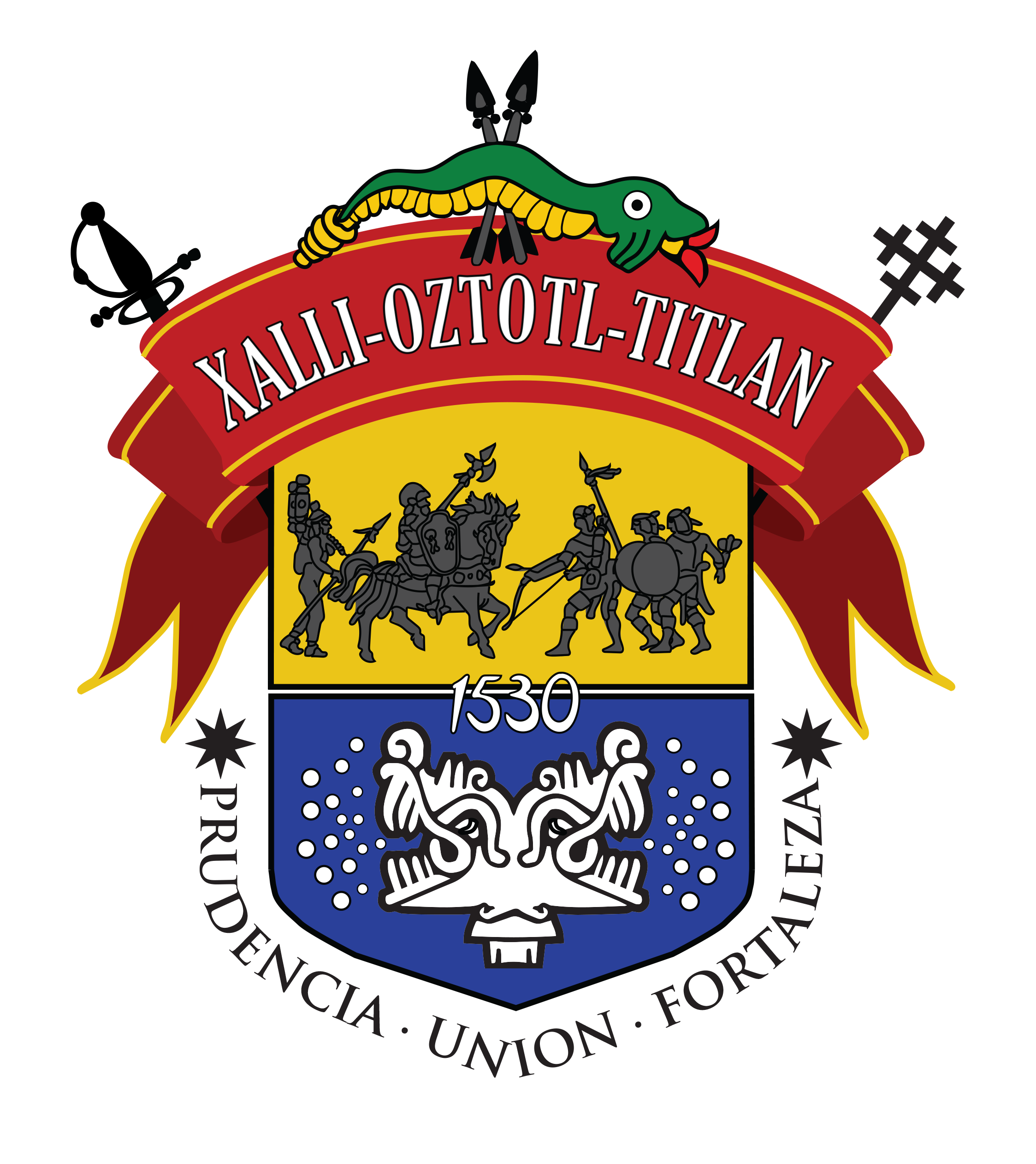 Escudo de Armas del municipio de Jalostotitlán